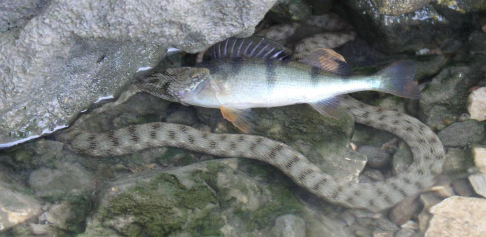 Schlange (Natrix tessellata) versucht Fisch (Perca fluviatilis) zu verschlingen. Donauufer bei Gura Vâii, Eisernes Tor, Rumänien 2011